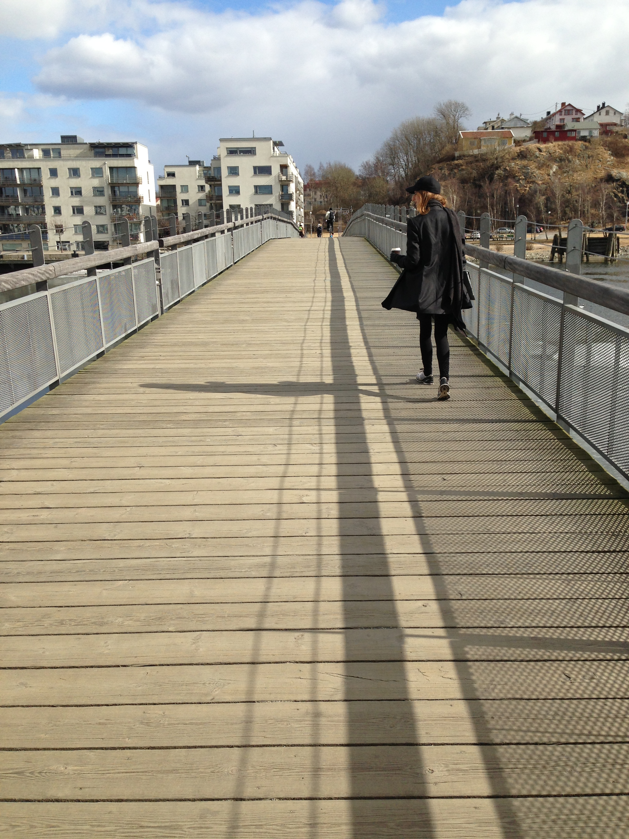 Sannegårdsbron, Hisingen, Göteborg, 2013